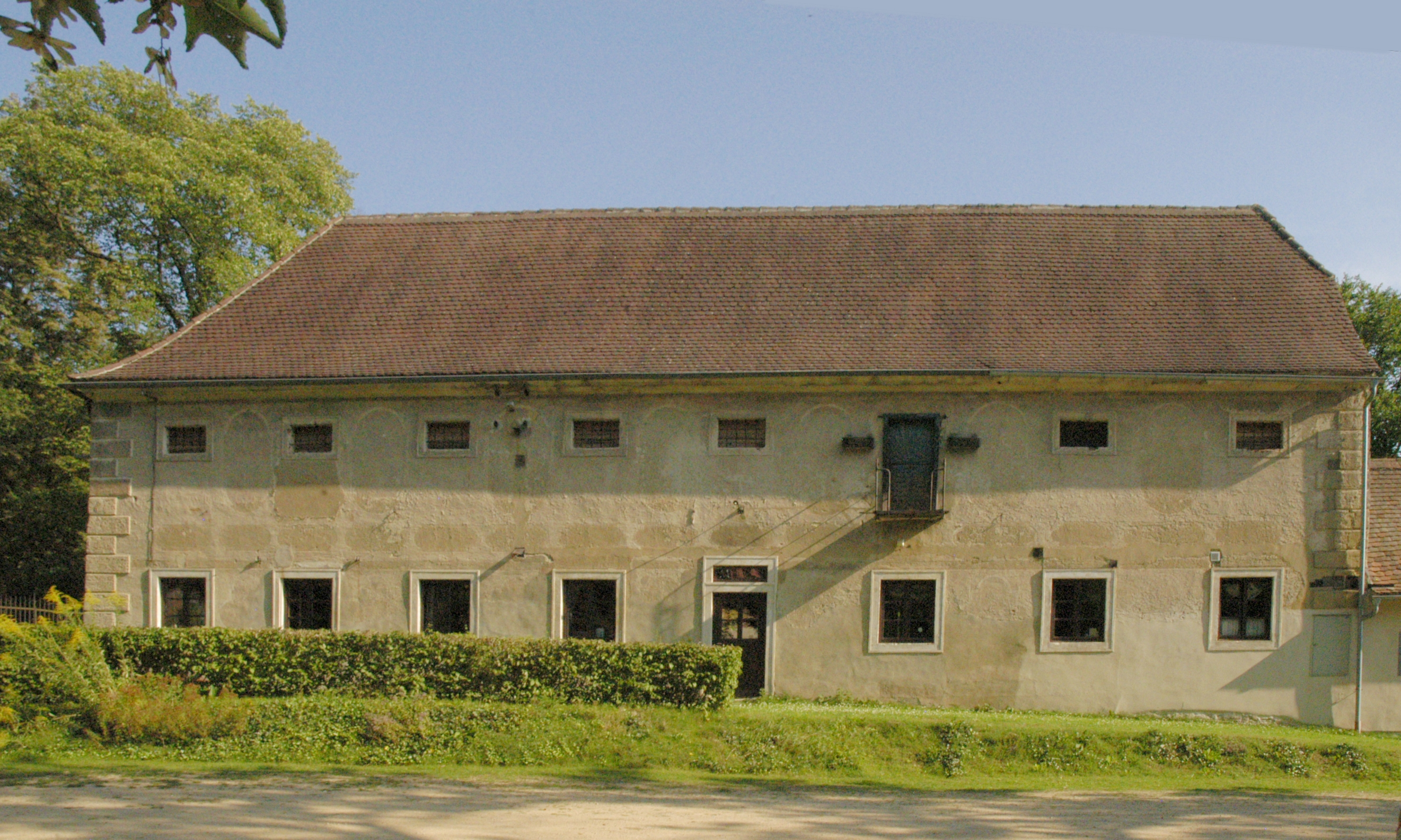 Ehemalige Gärtnerei im Schloss Greillenstein, Gemeinde Röhrenbach